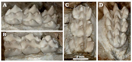 Tritylodontid cynodont Yuanotherium minor gen. et sp. nov. from the upper part of the Shishugou Formation (Oxfordian, Late Jurassic), Junggar Basin, northwestern Xinjiang, China. IVPP V15335 (holotype), showing details of PC1–3 in occlusolingual (A), occlusobuccal (B), occlusodistal (C), and occlusomesial (D) views.